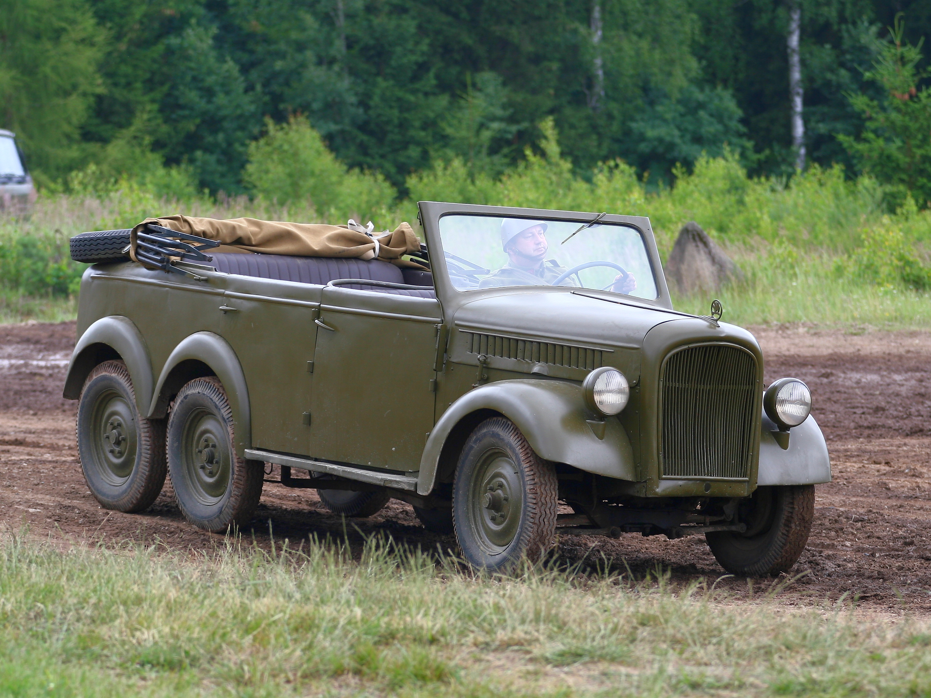 Rekonstrukce historických událostí, konkrétně potyček v německém pohraničí v roce 1938, při dynamických ukázkách na Dni pozemního vojska BAHNA 2018, který pořádá Velitel společných sil a Nadace pozemního vojska AČR.